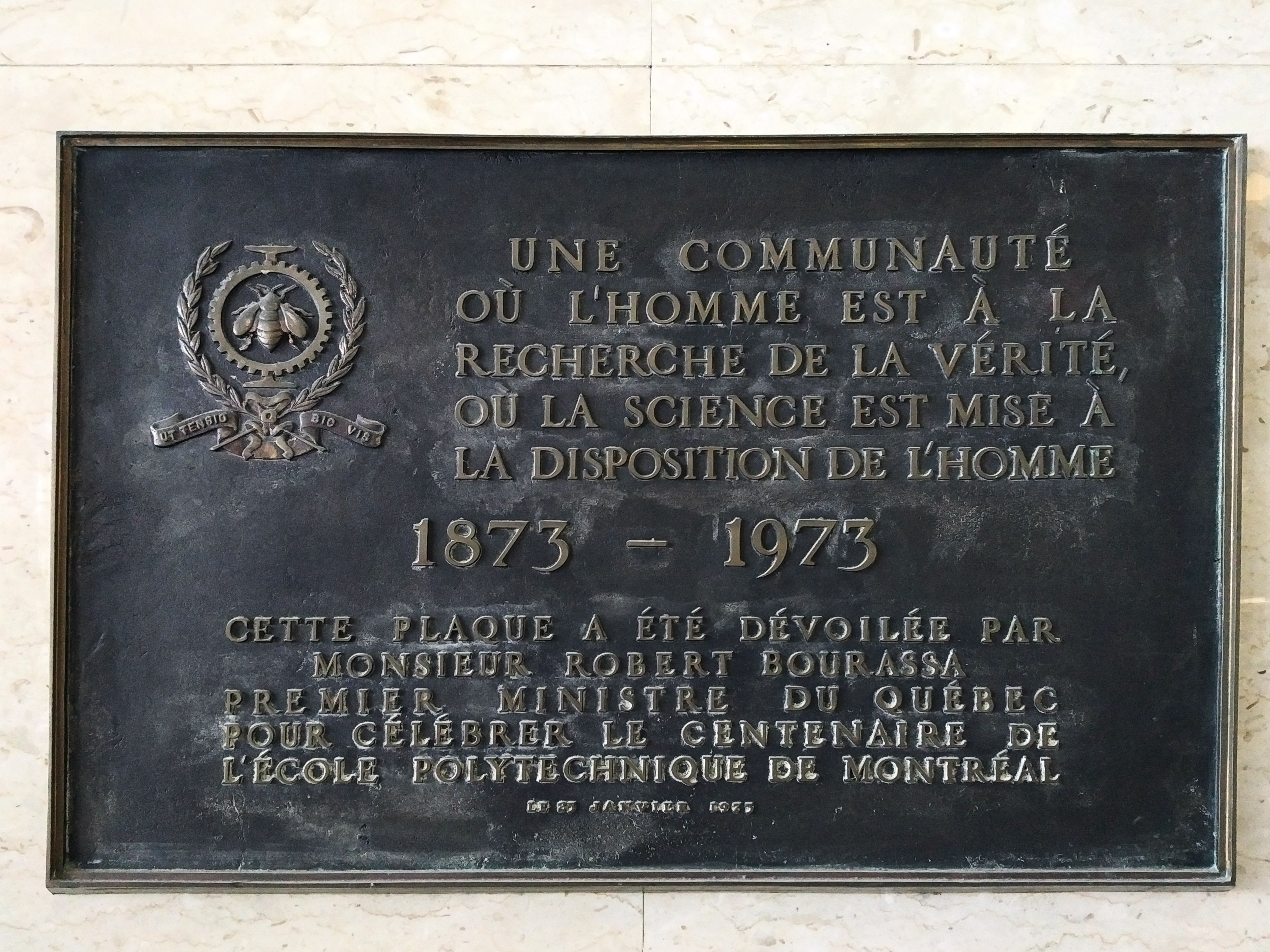 École Polytechnique de Montréal, hall d'entrée. Plaque commémorant le centenaire de l'institution. Une communauté où l'homme est à la recherche de la vérité, où la science est mise à la disposition de l'homme. 1873-1973. Cette plaque a été dévoilée par monsieur Robert Bourassa, premier ministre du Québec, pour y célébrer le centenaire de l'École Polytechnique de Montréal, le 27 janvier 1973.